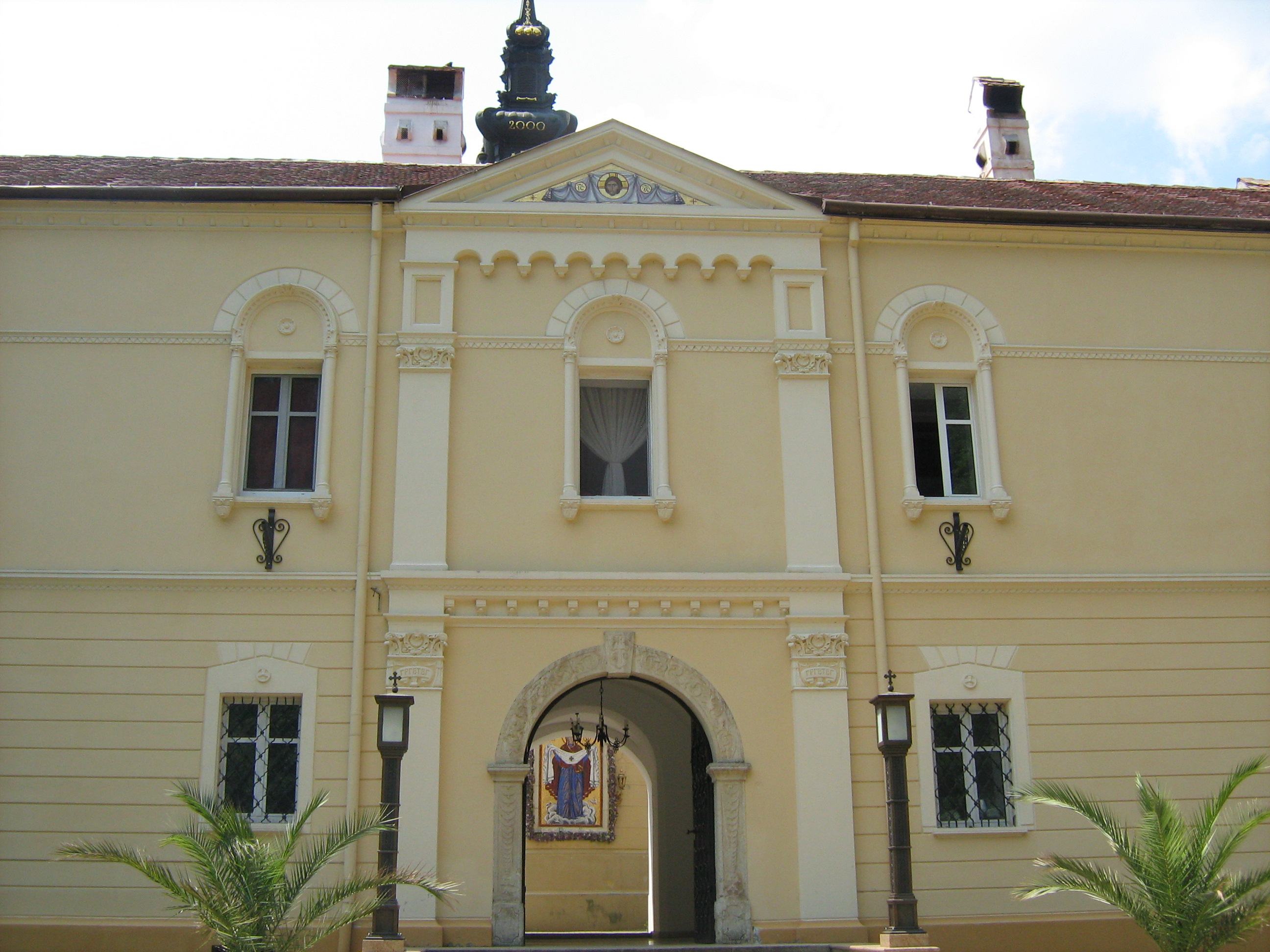 Конак манастира